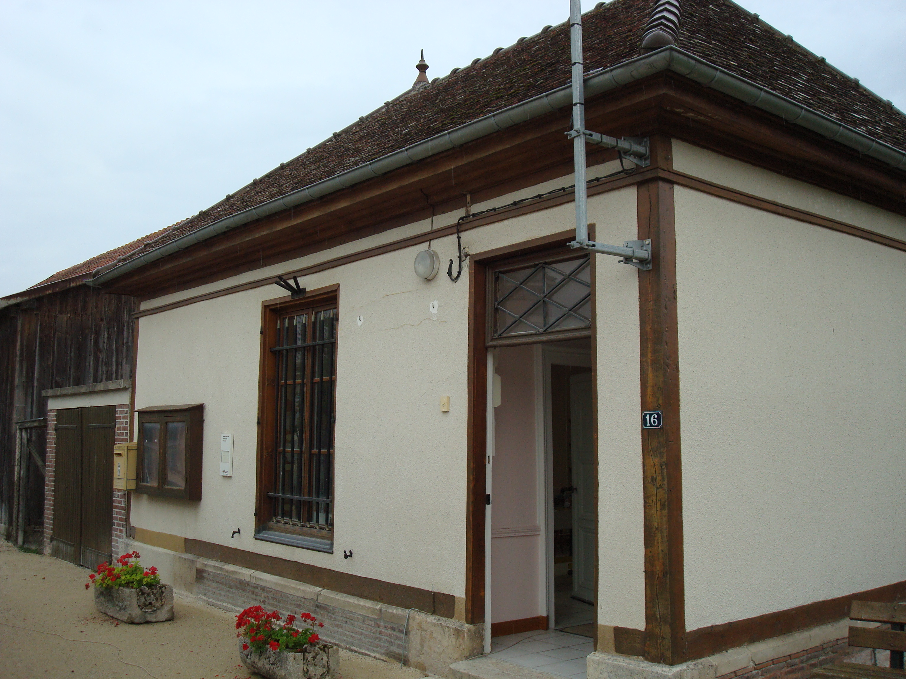 Villechetif